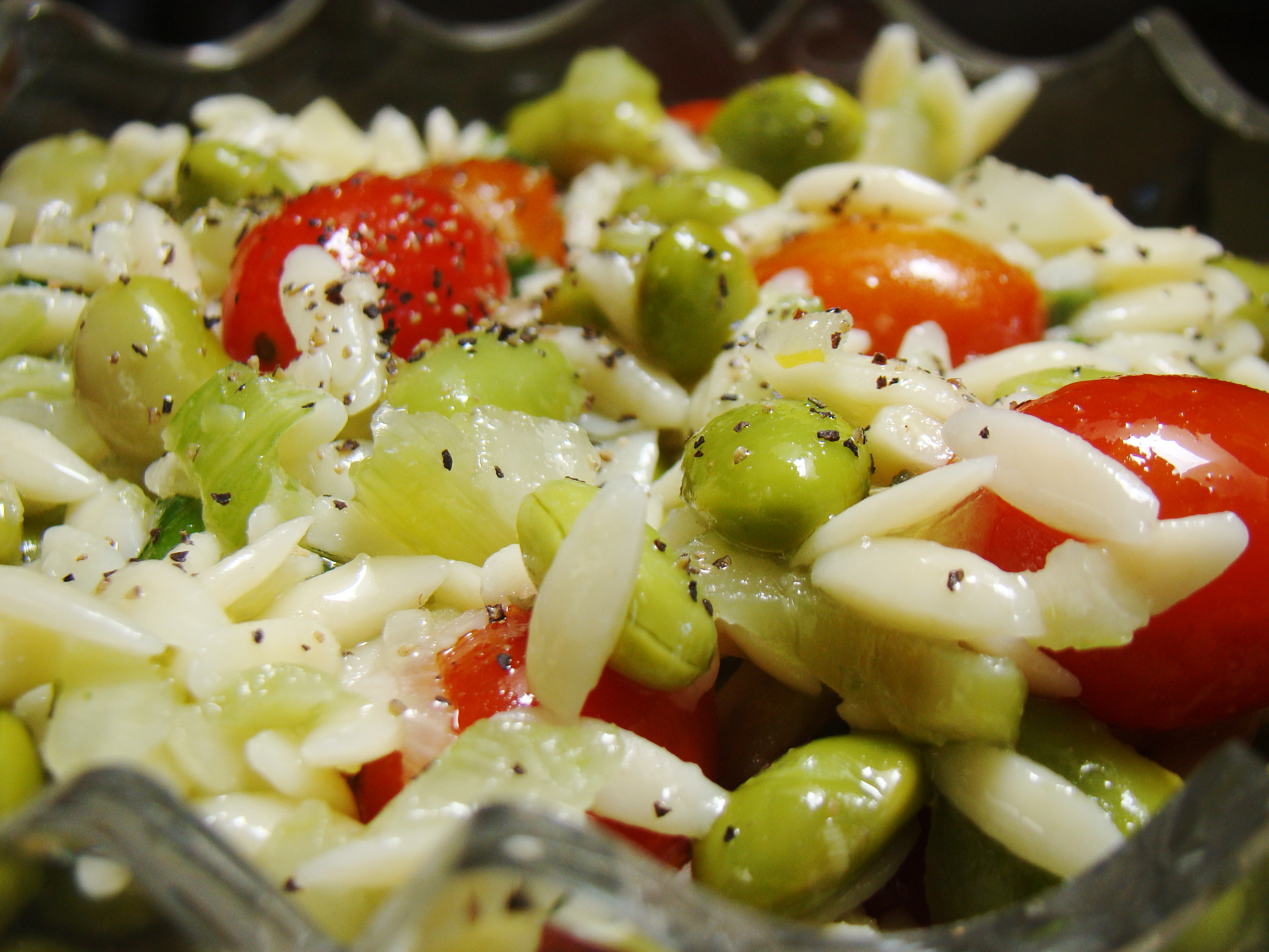 See File:Lemongrass Orzo Salad.jpg